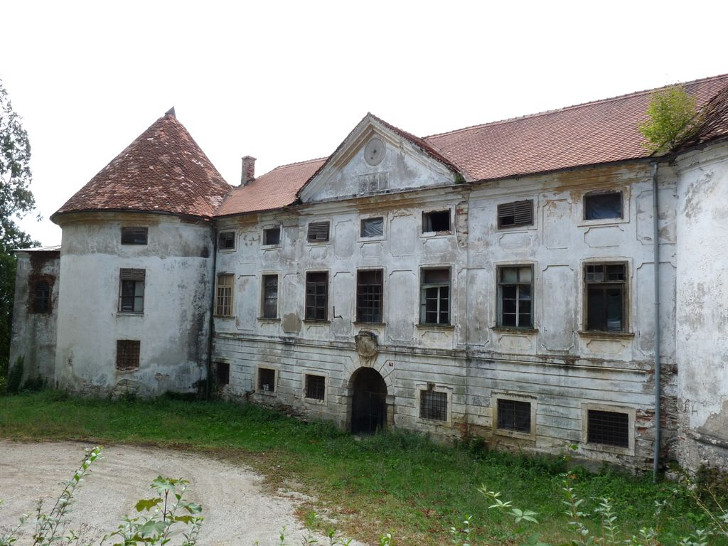 Auerspergov grad Turn (Šrajbarski turn) nad Leskovcem pri Krškem